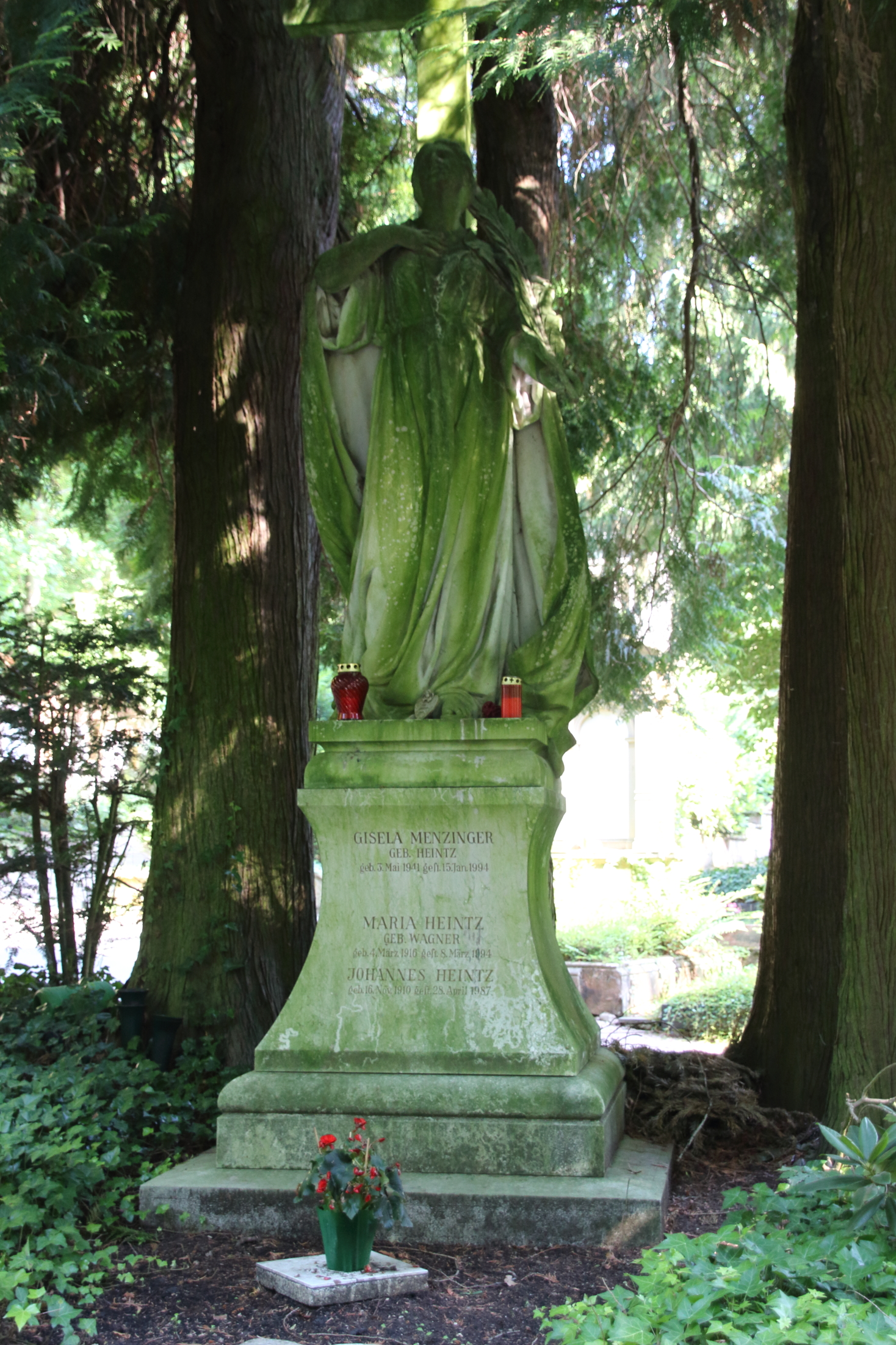 Grabmal der Familien Carl Wachendorff (1853-1896) und Rudolph Koepp (1830-1897). Figur "Beseligender Glaube" vom Bildhauer Robert Cauer dem Jüngeren. Neubelegung 1994. Nordfriedhof Wiesbaben. Inschrift auf der Rückseite: Dr. phil. Carl Wachendorff geb. 28. Dez. 1853, gest. 18 Okt. 1896 Rudolph Koepp Kgl. Preuss. Kommerzienrat geb. 16. Feb. 1830, gest. 6. April 1897 Elly Wachendorff geb. 20. Mai 1886, gest. 28. Aug. 1900 Rudolph Wachendorff geb. ?? März 1888, gest. 10. Jan. 1907 Frau Dr. Amelie Wachendorff ?? geb. Koepp danach unleserlich